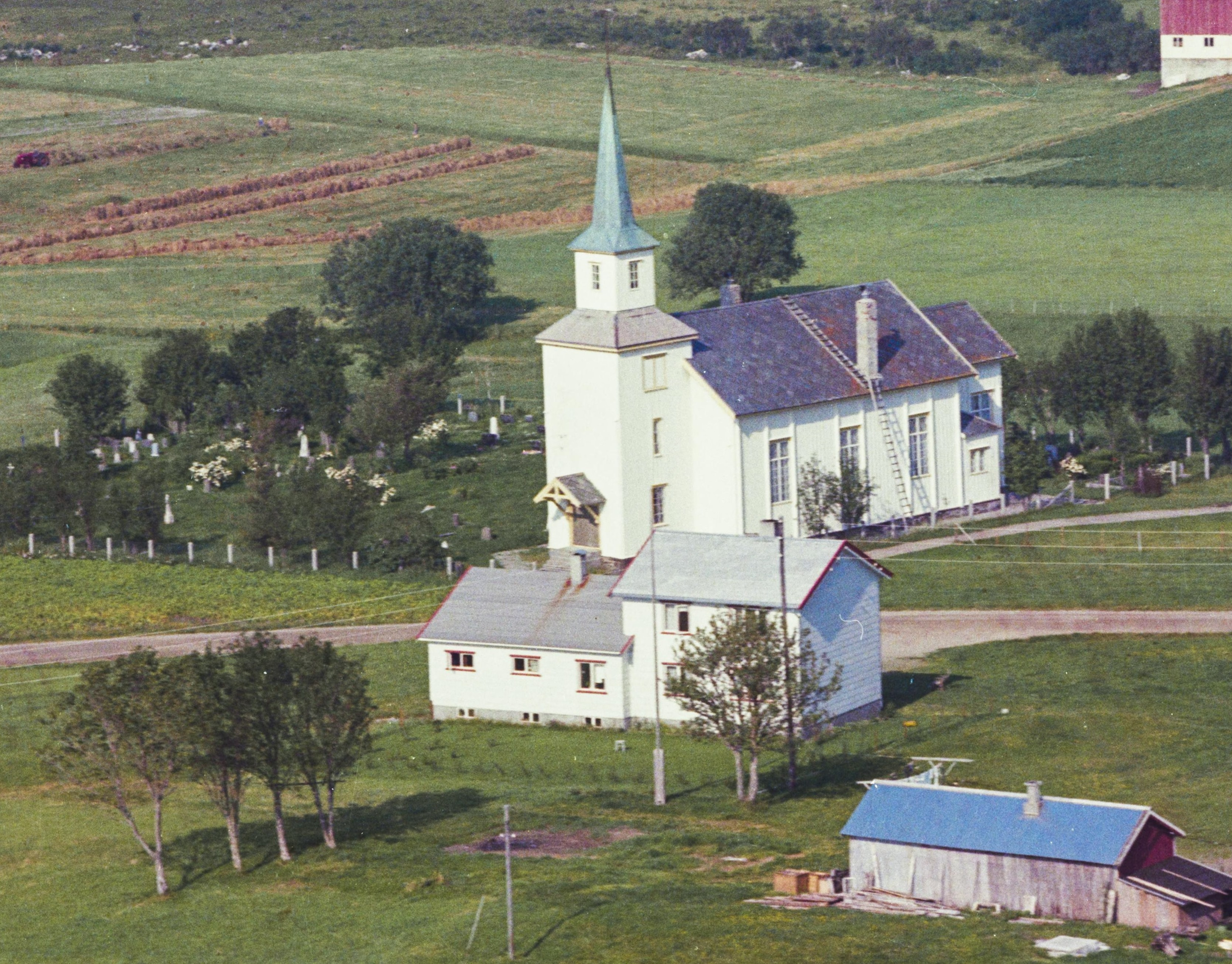 Solstad kirke. Foto: Widerøes Flyveselskap. Fra Nasjonalbibliotekets Samling.